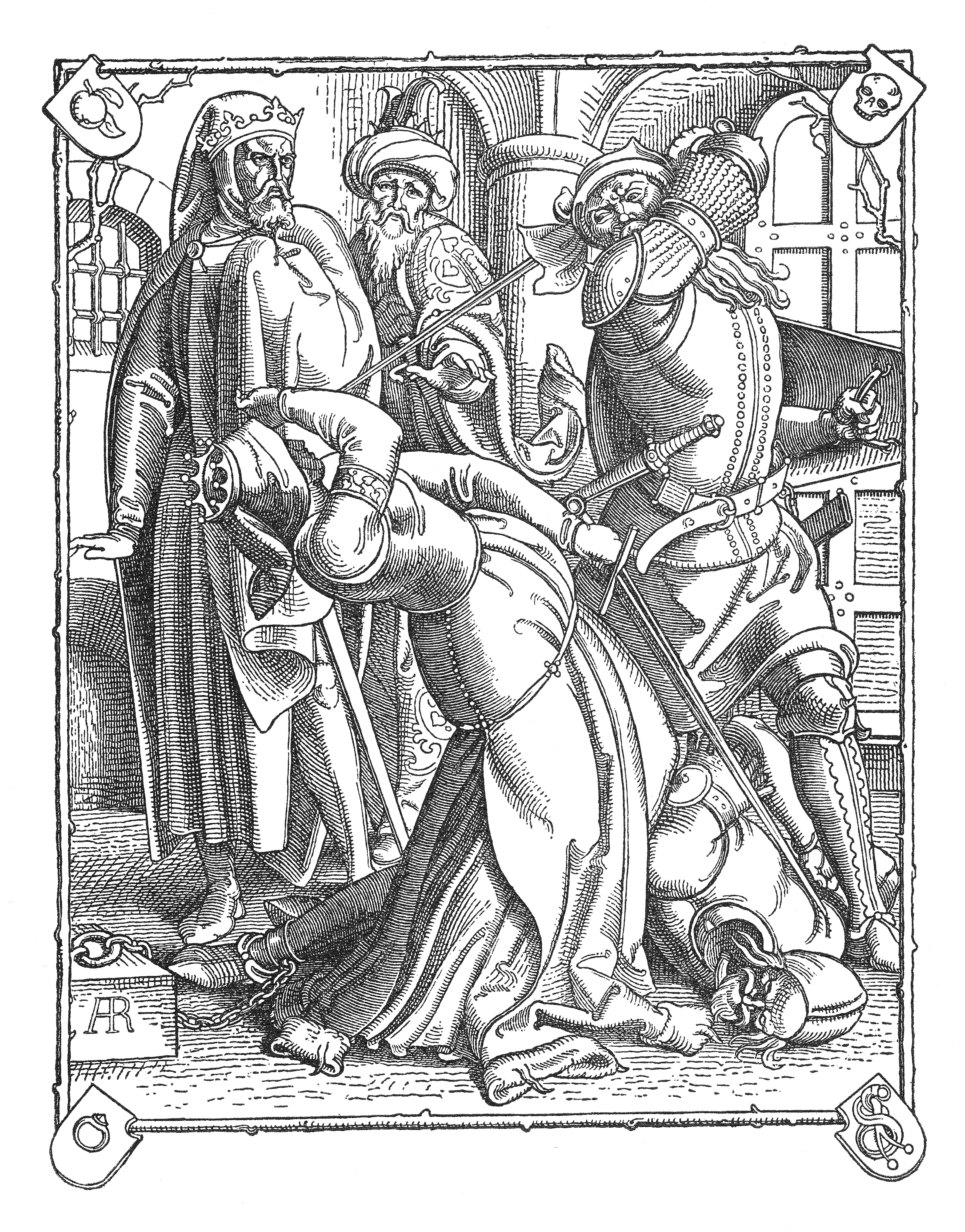 Wie Gunther Hagen und Kriemhilde erschlagen wurden. (Nachdem Kriemhild den gefesselten Hagen von Tronje tötete erschlug wurde diese von Hildebrand erschlagen. Im Hintergrund links Dietrich von Bern , daneben Etzel.) Zeichnung zur 39. Aventure, geschnitten von Braun und Dessauer.